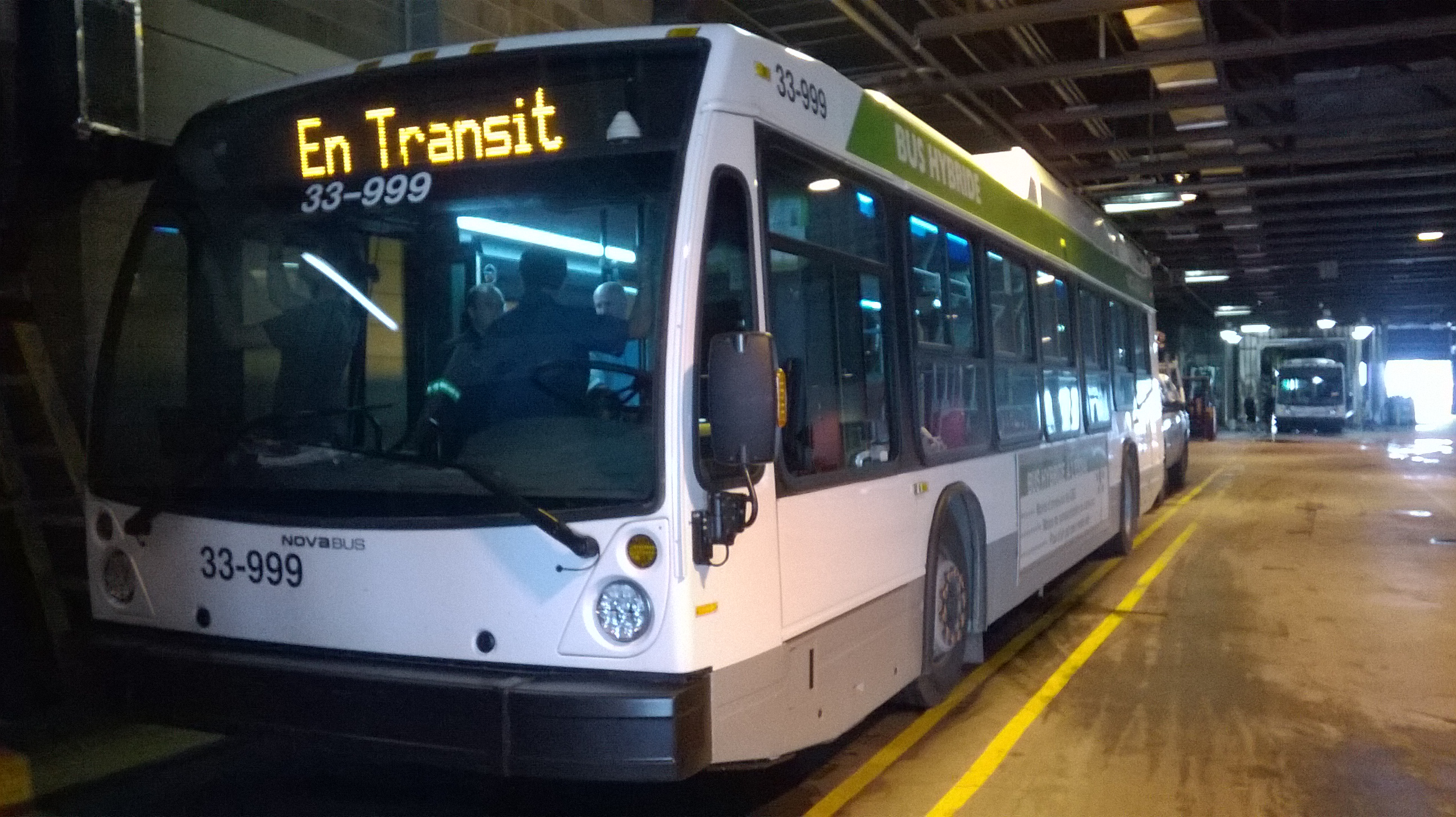 Novabus LFS HEV DÉMONSTRATEUR 33-999